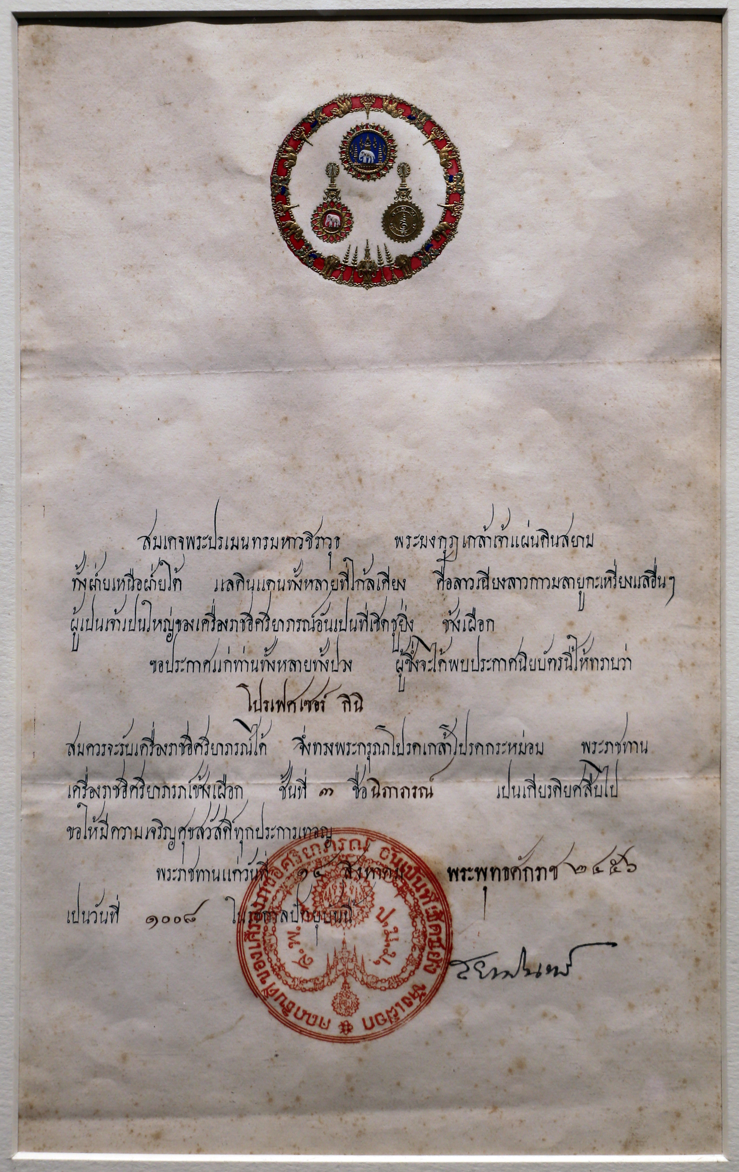 ตัวอย่างของประกาศนียบัตรสำหรับผู้ได้รับพระราชทานเครื่องราชอิสริยาภรณ์อันเป็นที่เชิดชูยิ่งช้างเผือกในอดีต ในที่นี้ เป็นประกาศนียบัตรของศาสตรจารย์กาลิเลโอ คินี จิตรกรชาวอิตาลีผู้วาดภาพจิตรกรรมประดับโดมเพดานของพระที่นั่งอนันตสมาคม ซึ่งได้รับพระราชทานเครื่องราชอิสริยาภรณ์อันเป็นที่เชิดชูยิ่งช้างเผือก ชั้นที่ 3 นิภาภรณ์ จากพระบาทสมเด็จพระมงกุฎเกล้าเจ้าอยู่หัว เมื่อวันที่ 14 สิงหาคม พ.ศ. 2456